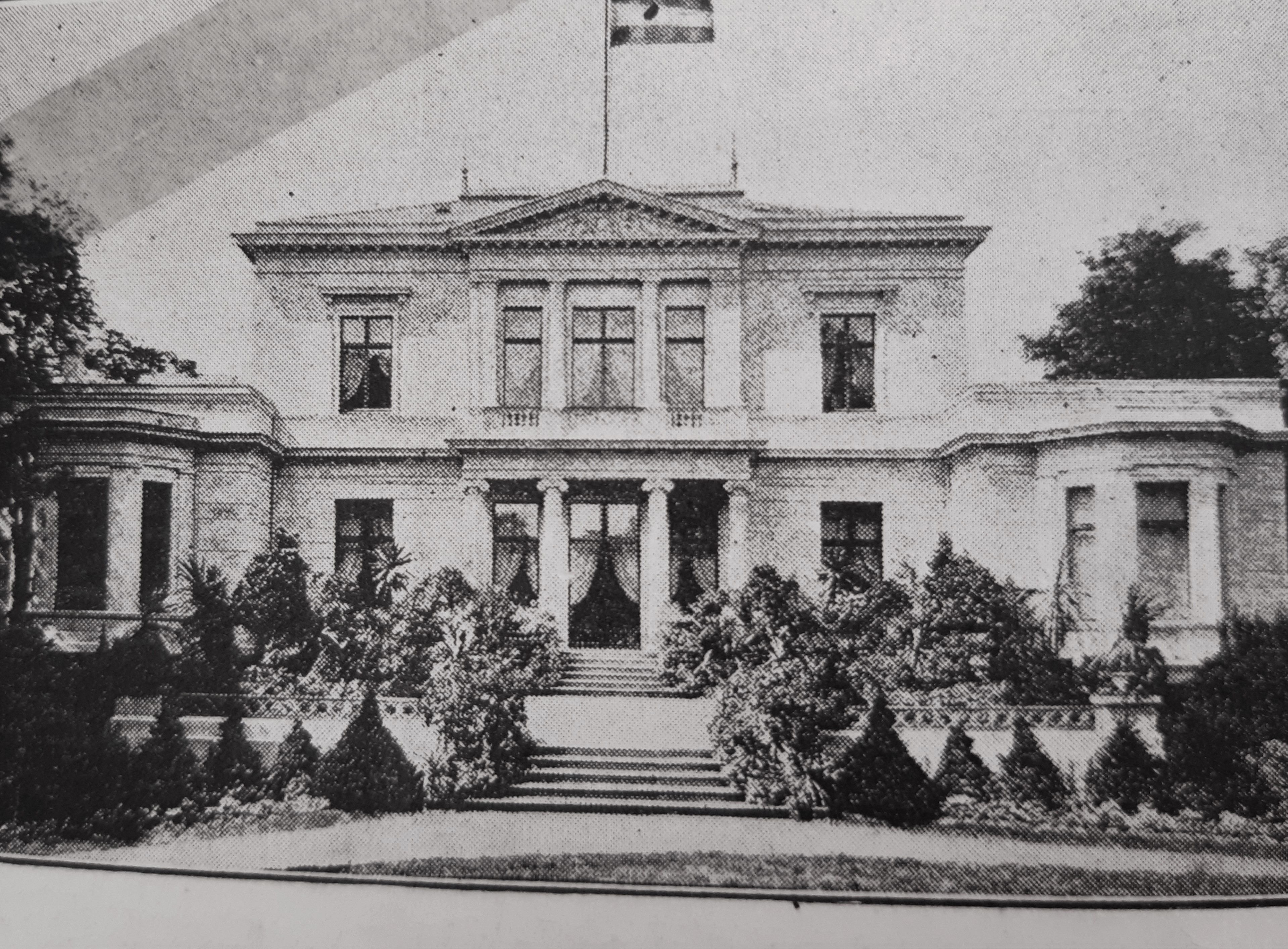 später Budge Palais (Umbau ab 1903)